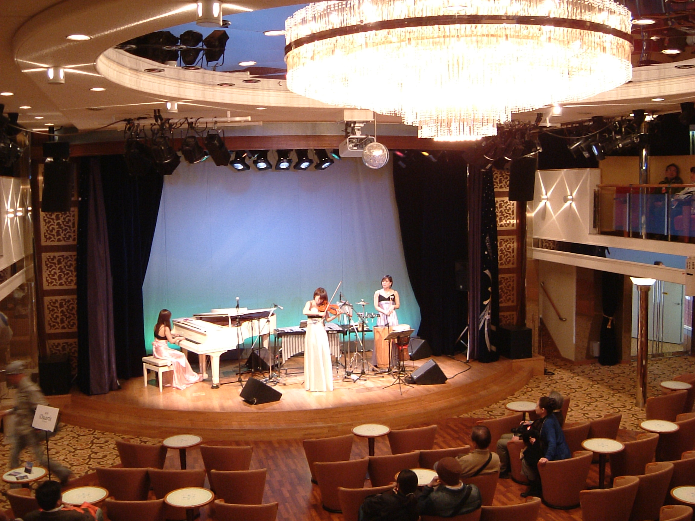 豪華客船にっぽん丸のドルフィンホール